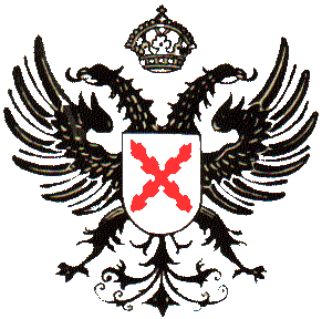 Águila del requeté